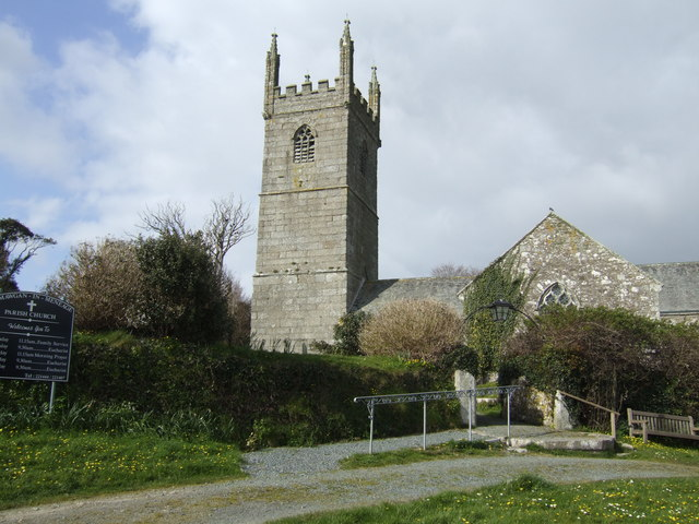 St. Mawgan-in-Meneage church